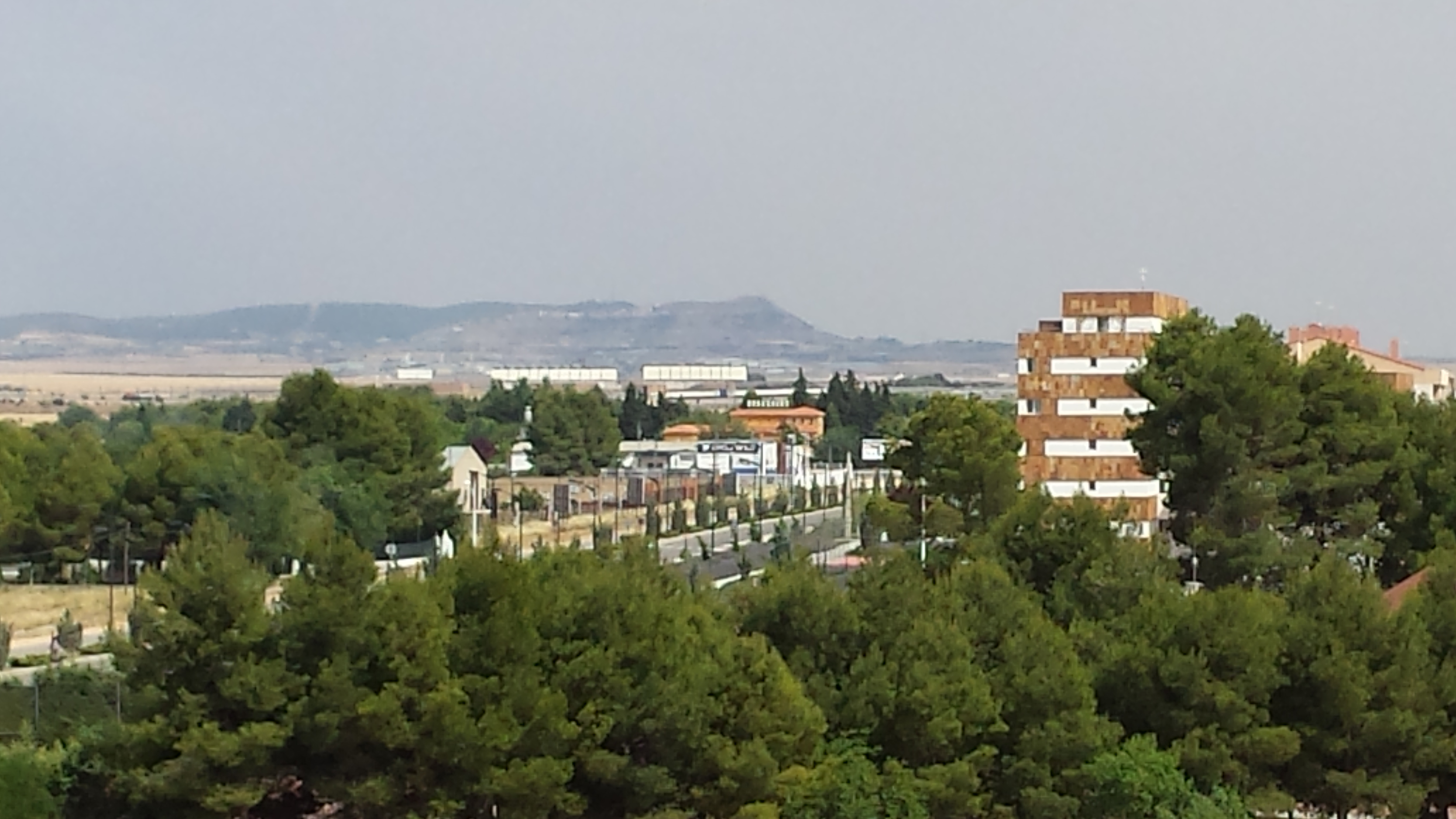 Vista de Chinchilla de Montearagón desde Albacete. Barrio Facultad de Medicina. Albacete